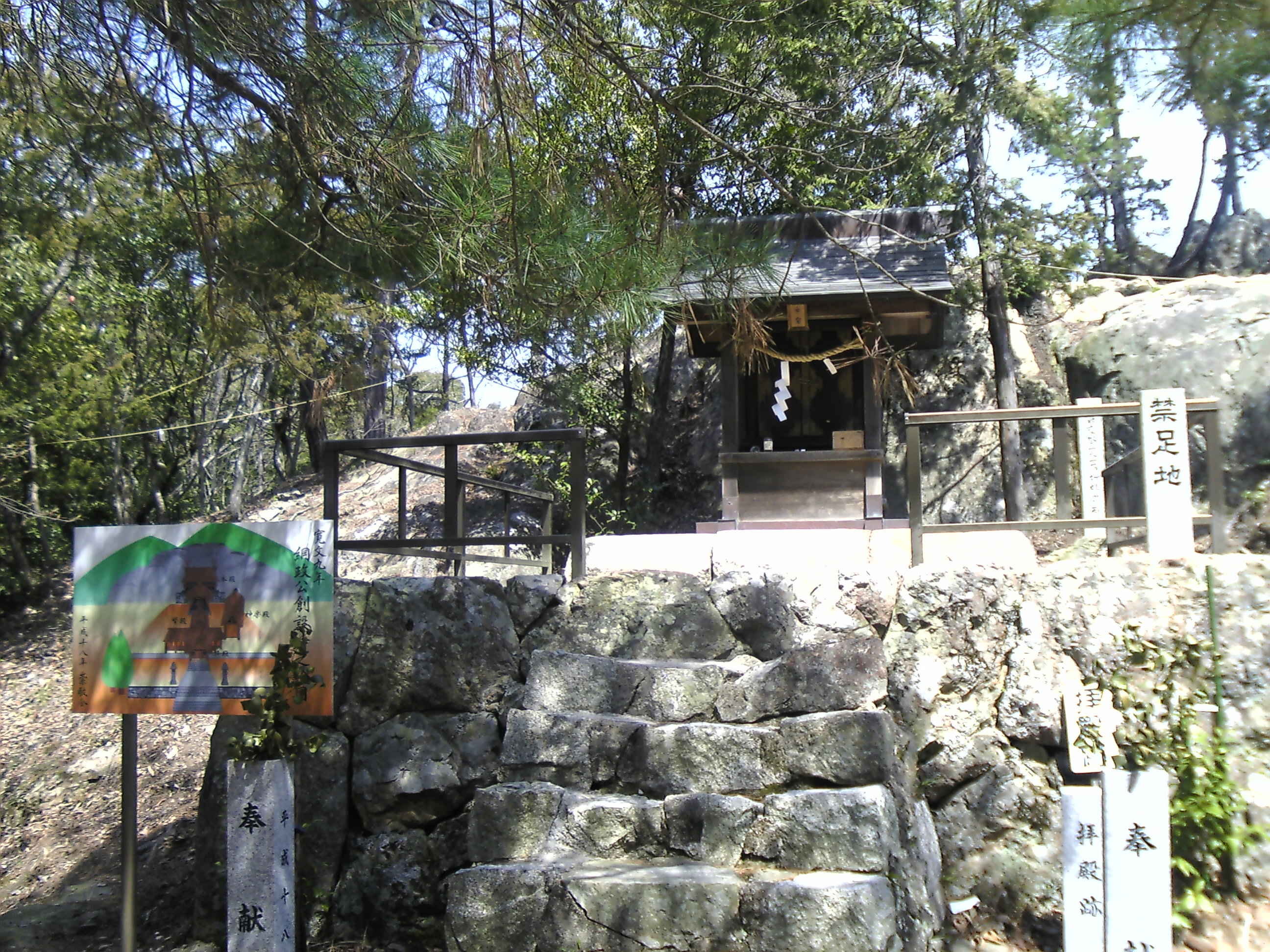 original shrine of Isonokamifutsumitama jinja